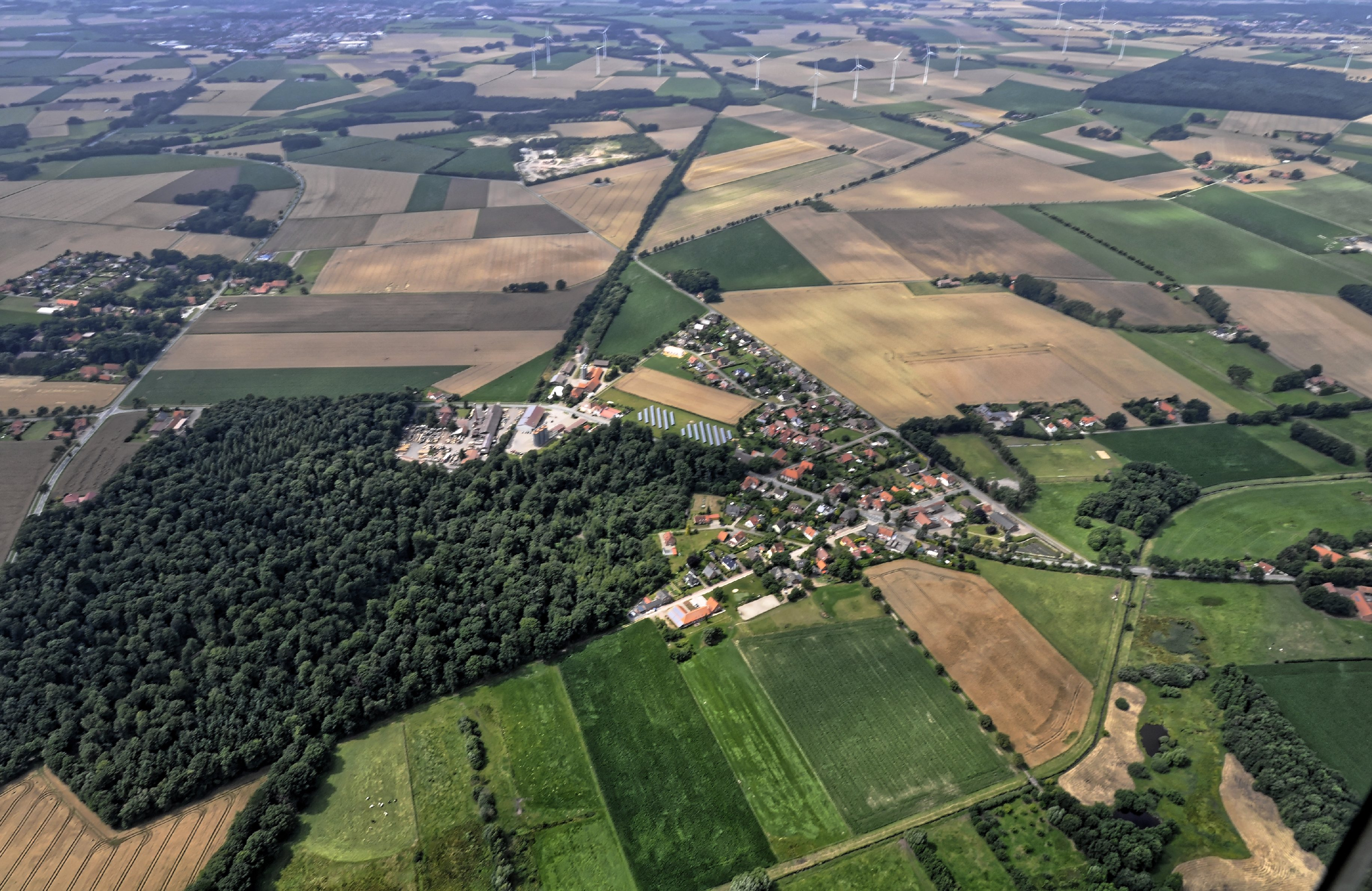 Bilder vom Flug Nordholz-Hammelburg 2015: Mellinghausen-Am Bahnhof. Links Maasen. Im Hintergrund die 2017 geschlossene Sandgrube Maasen.